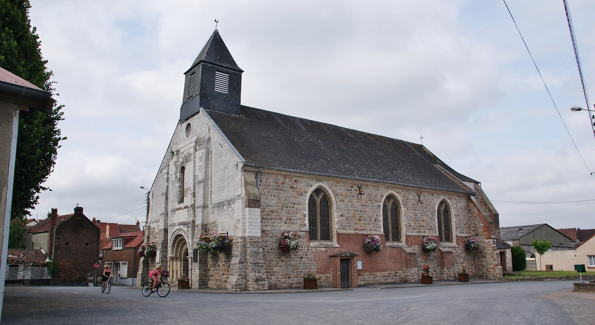 L'église